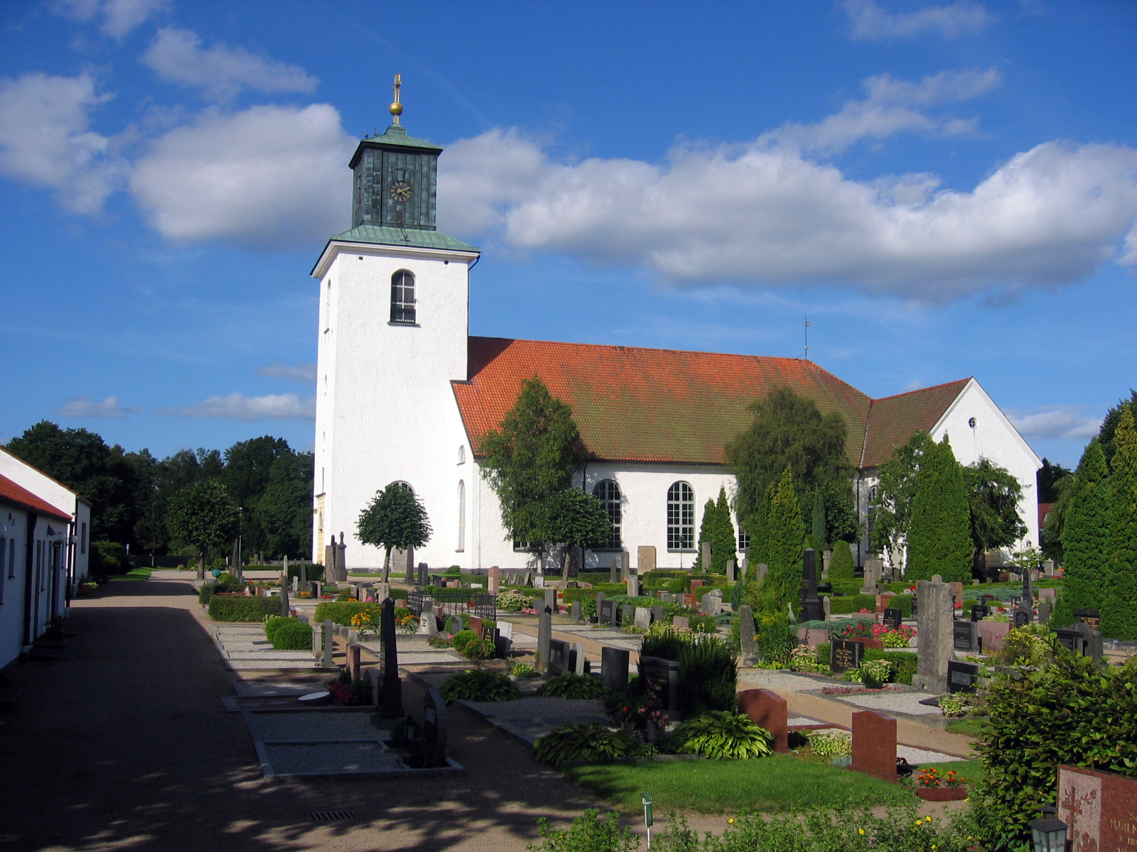 Osby kyrka